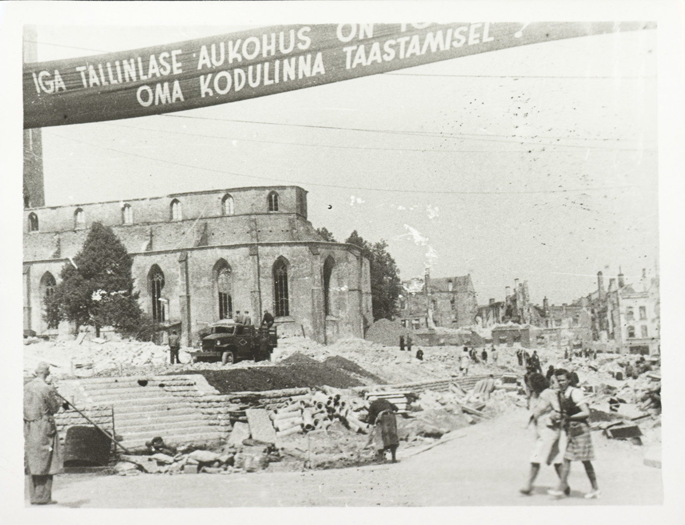 Taastamistööd Harju Rüütli tänaval (vaade Niguliste kirikule)